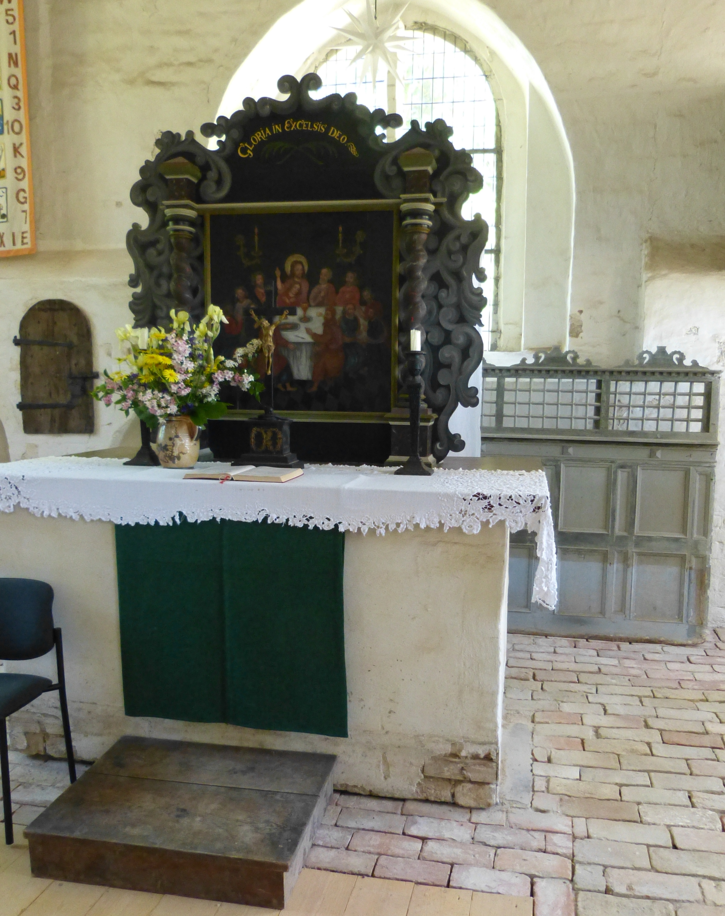 Kirche in Pinnow (Murchin), Altar